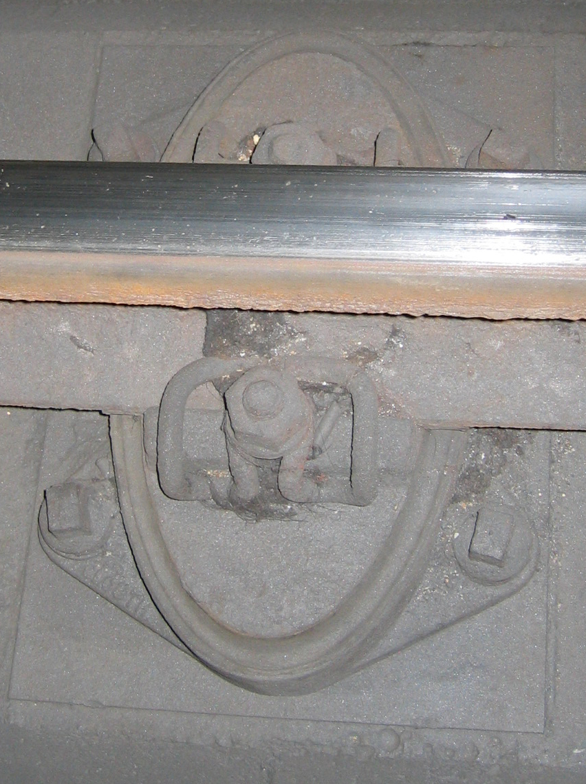 Ein Kölner Ei, aufgenommen an der Stadtbahn-Station Friesenplatz